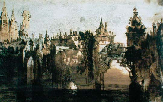 Ville au pont rompu, Victor Hugo, 1847. Encre brune, composé épais soluble brun, crayon lithographique noir, pigments secs (gris et noir), plume, pinceau et espèce d'aiguille (13,7 × 20,9 cm), Maison de Victor Hugo (nº 51).